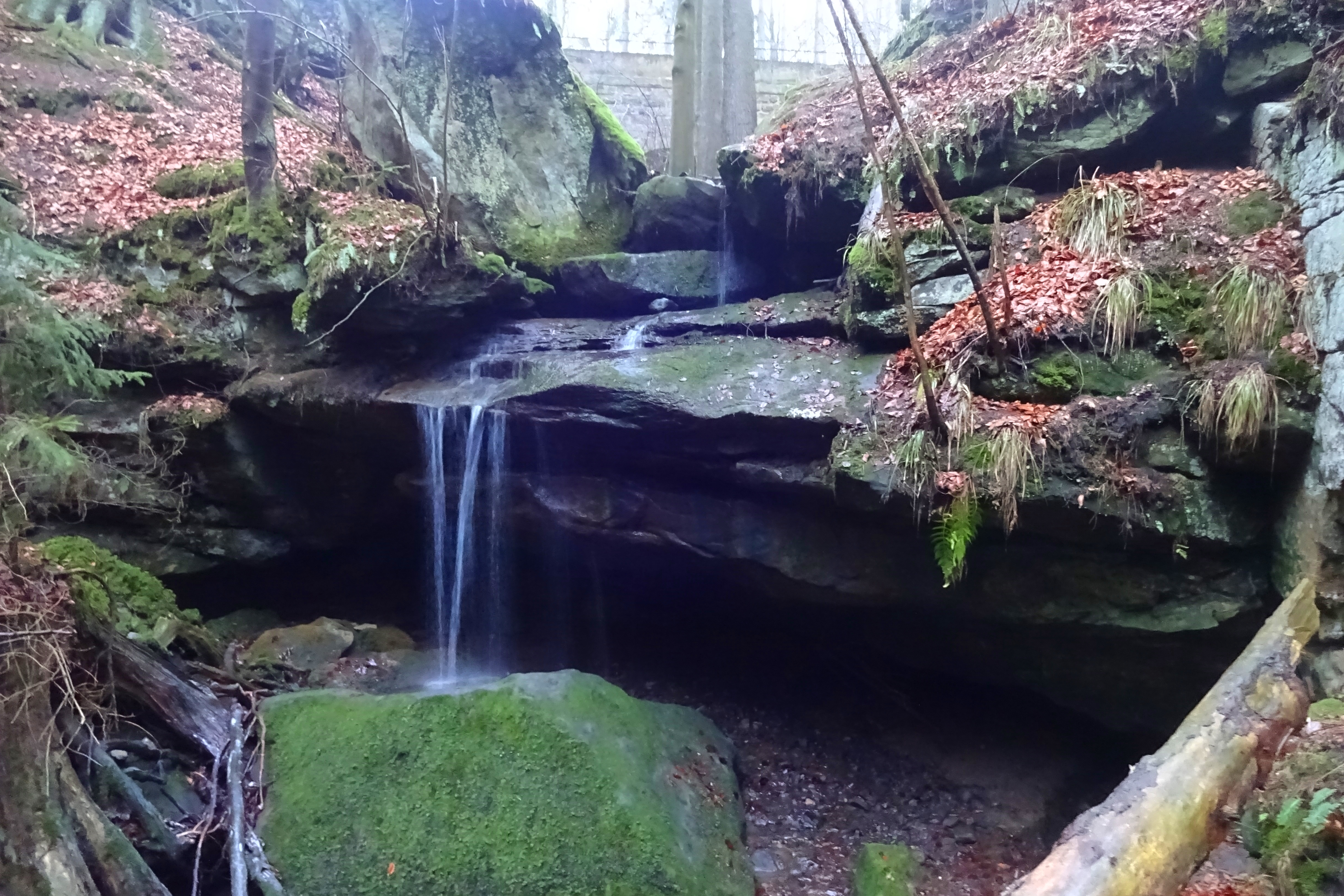 Naturschutzgebiet „Teufelsloch“ Nähe Oberwaiz, Eckersdorf. Geotop (472R019) und Naturschutzgebiet (NSG-00035.01)